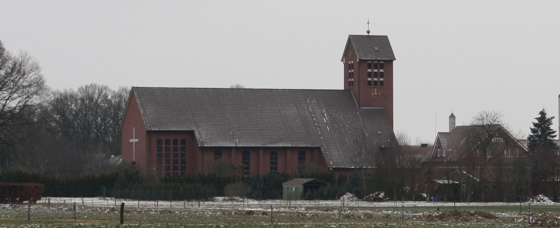 St.Bonifatius